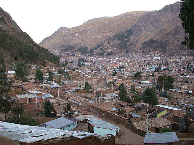 Vista de la ciudad de Huancavelica.